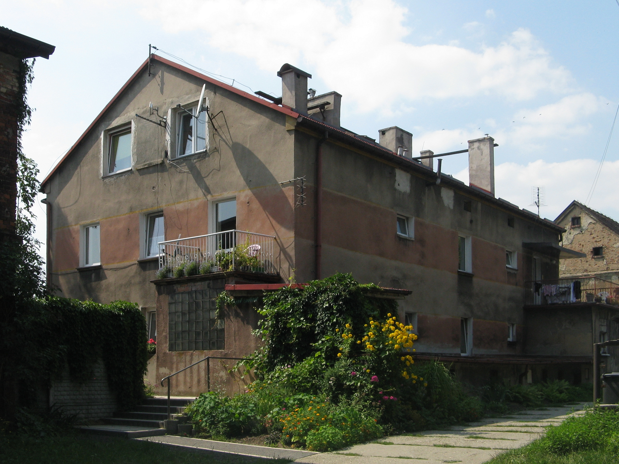 Dwór w Bytomiu-Stolarzowicach z XVIII wieku, przebudowany w XIX wieku, zabytek nr rej. 662/66 z 28.05.1966, ul. Stolarzowicka 144